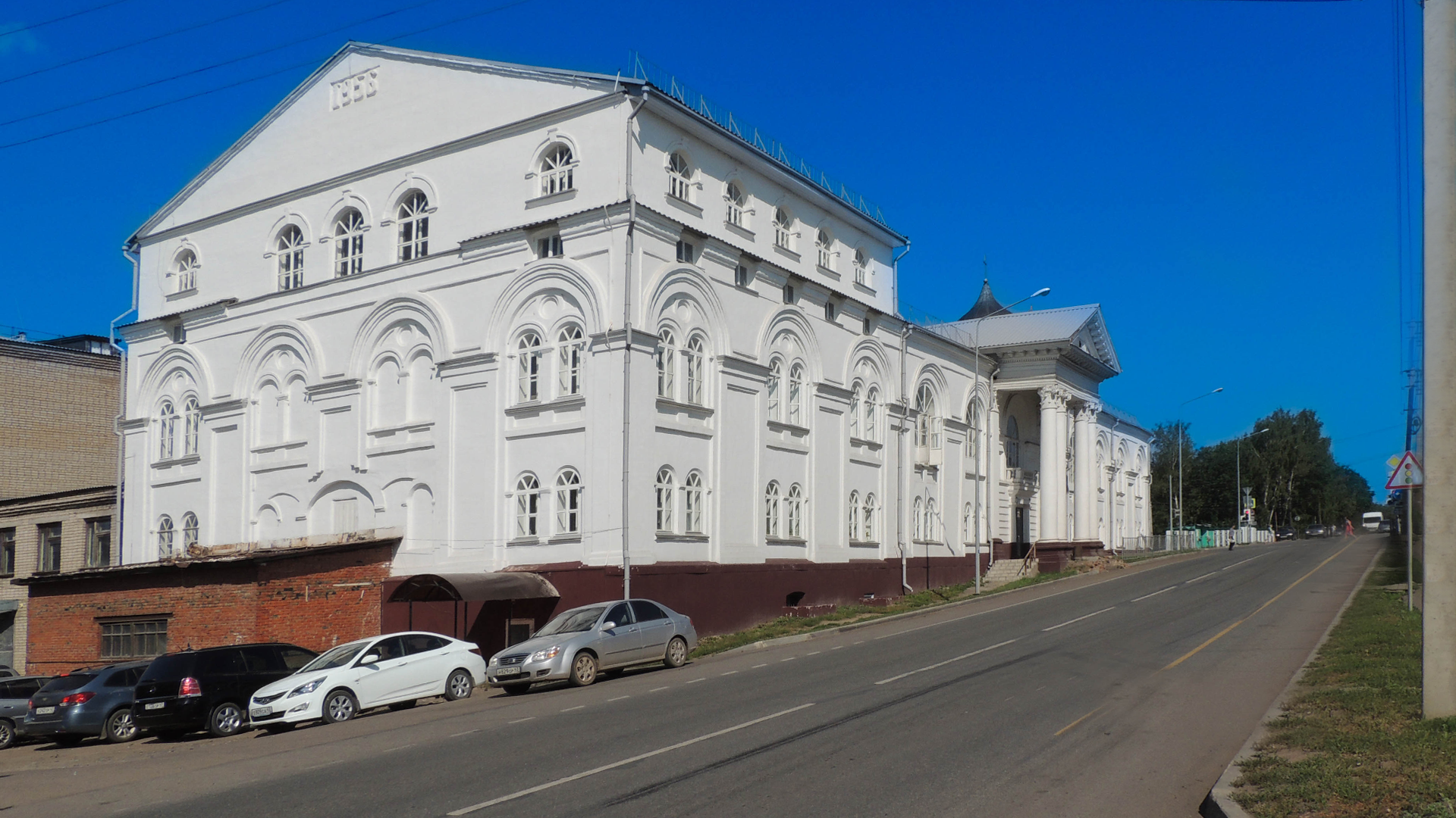 Корпус торговых рядов (сейчас Районный дом народного творчества): улица Карла Маркса, Яранск, Яранский район, Кировская область